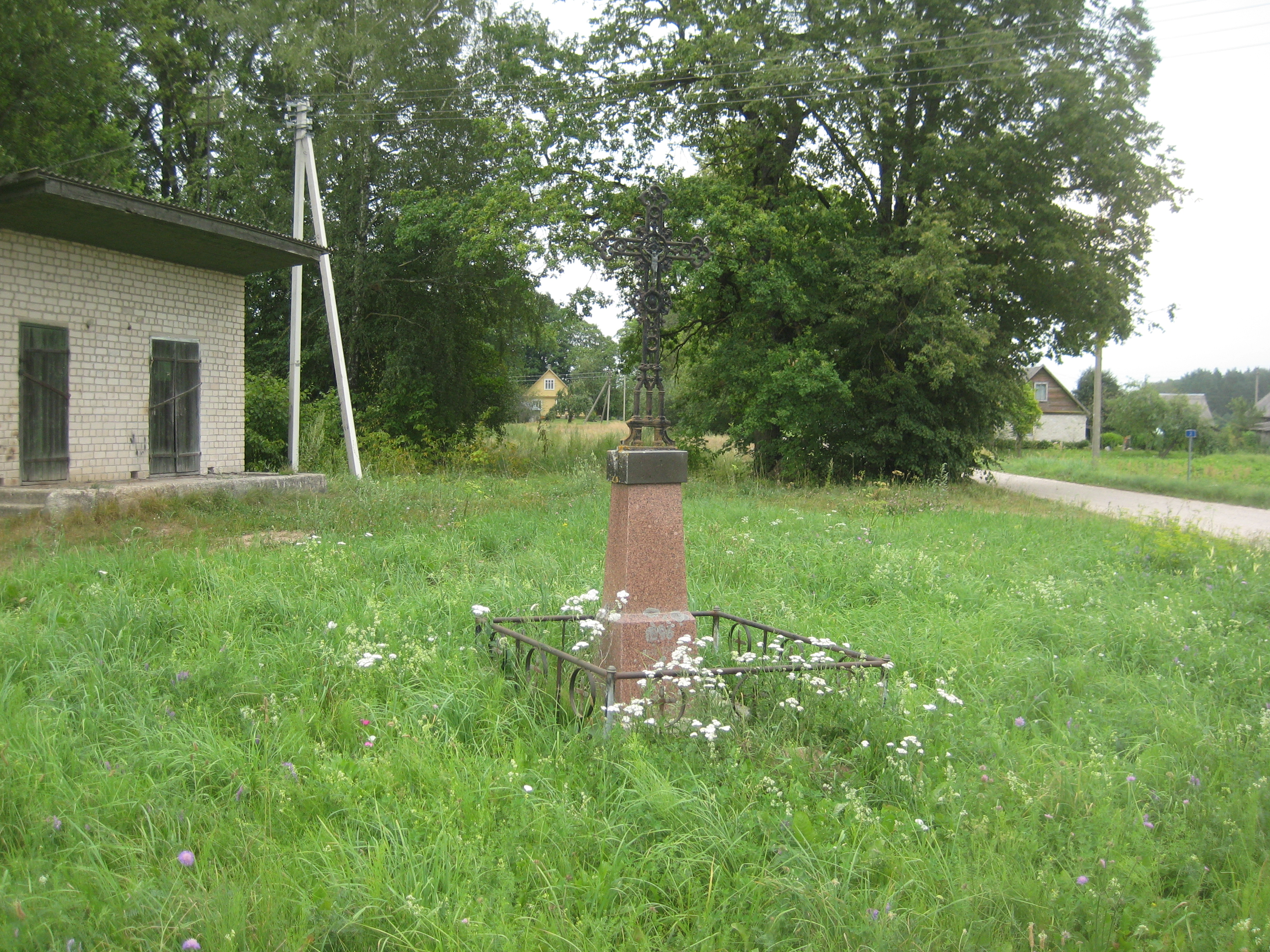 Kriaunų sen., Lithuania